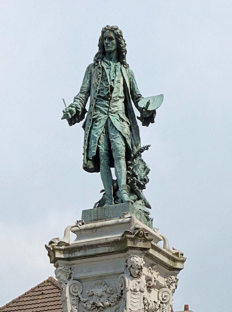 Monument à Antoine Watteau à Valenciennes